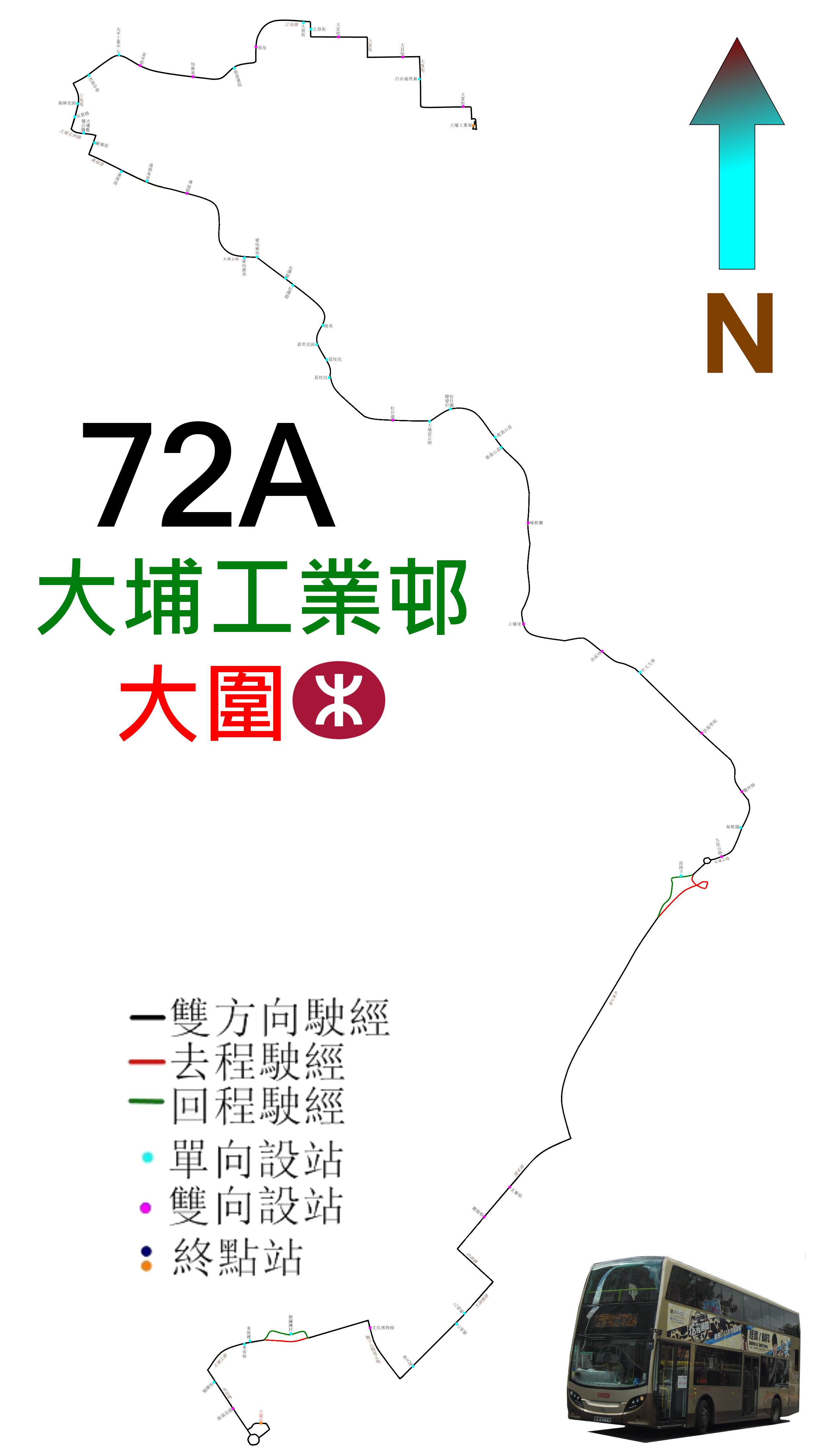 中文（香港）: 九巴72A線的走線圖